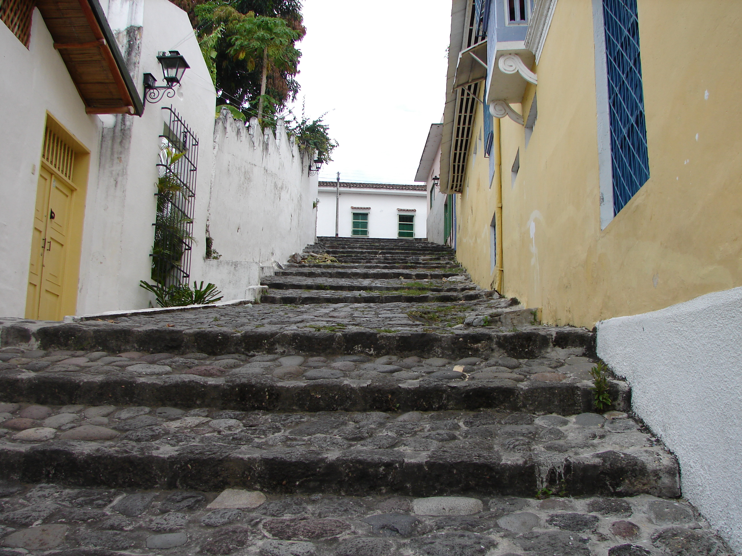 carrera de las trampas, sitio colonial español. Honda tolima.